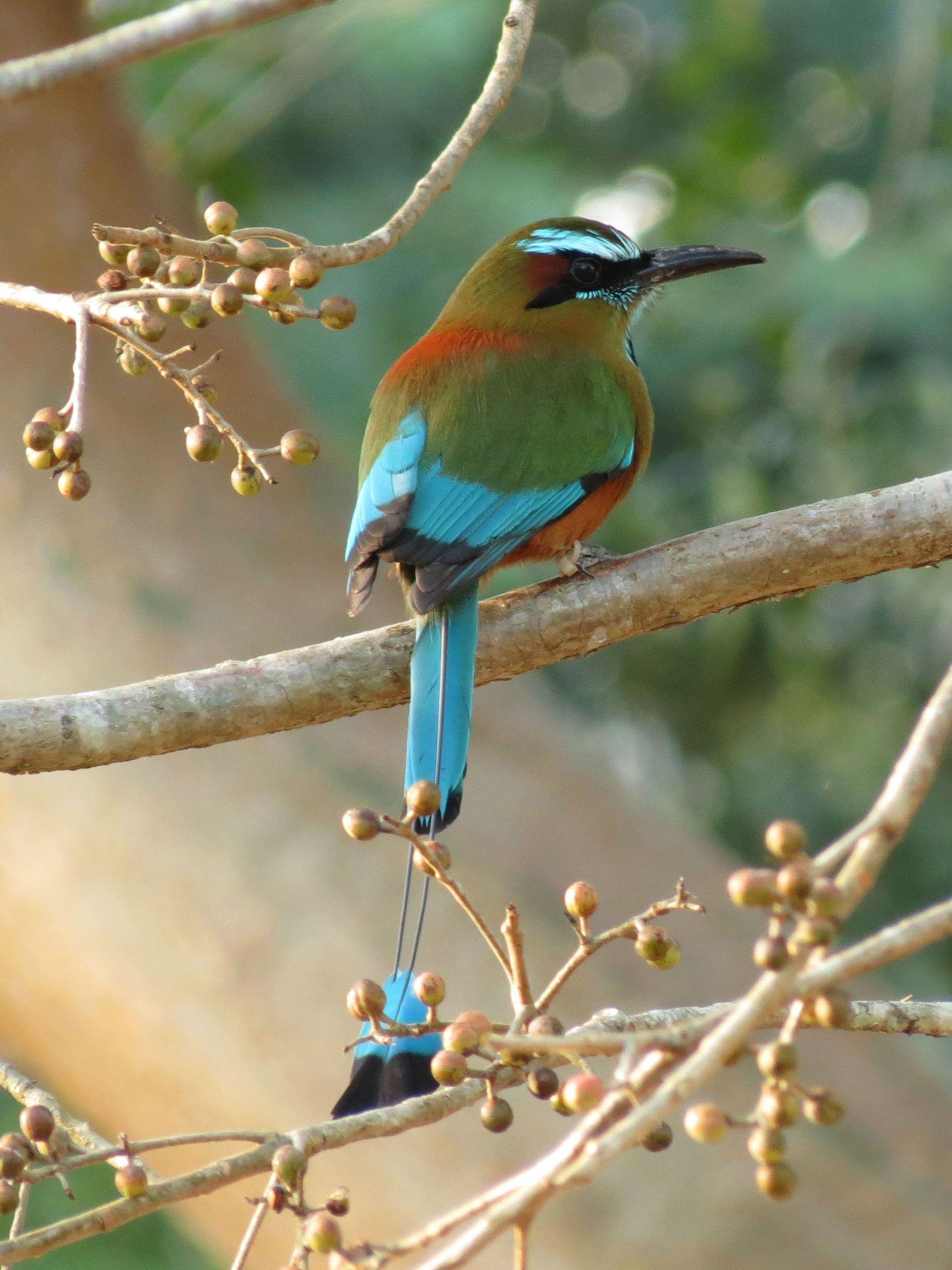 Eumomota superciliosa. Sitio arqueológico Uxmal, Yucatán, México.